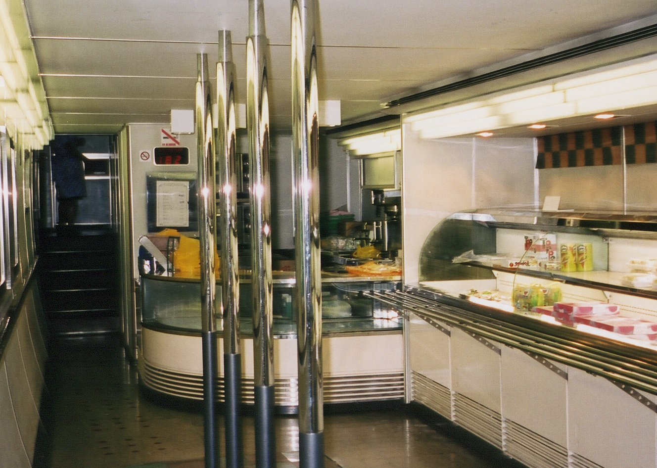 100系G編成カフェテリア